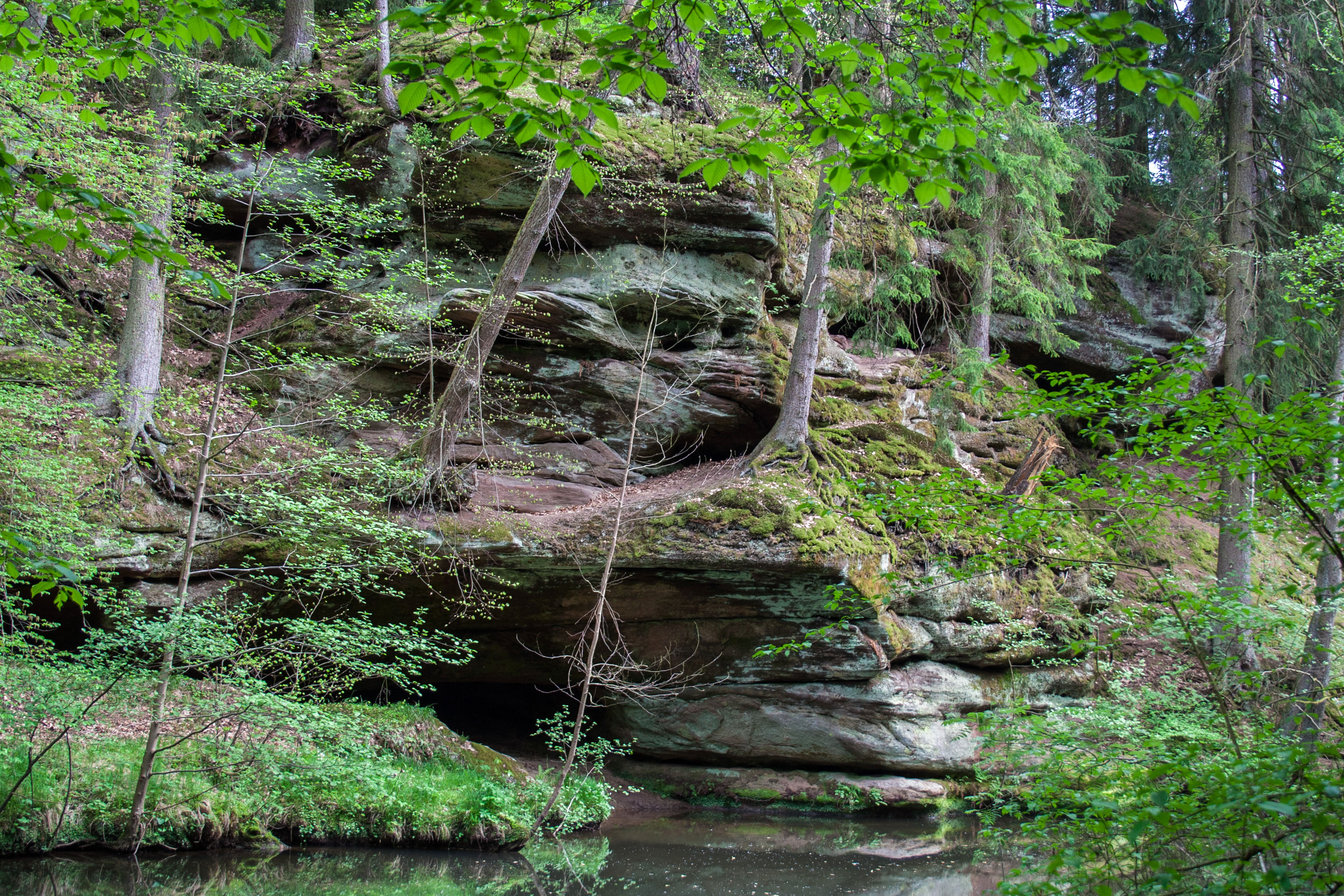 Schwarzachtal, Klamm, Fels am Südufer